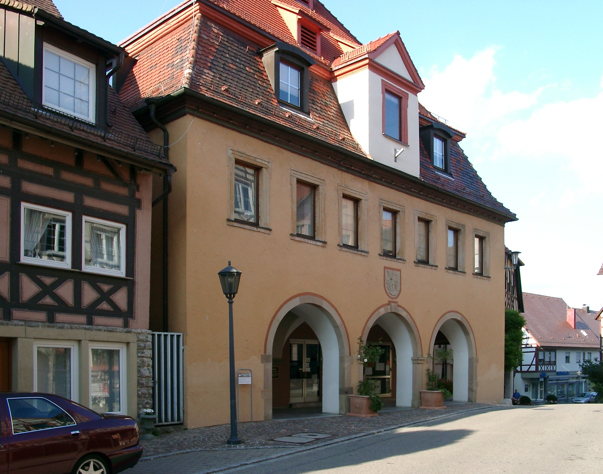 Forchtenberg, Rathaus; Geburtshaus von Sophie Scholl, hier verbrachten die Geschwister Scholl ihre Kindheit